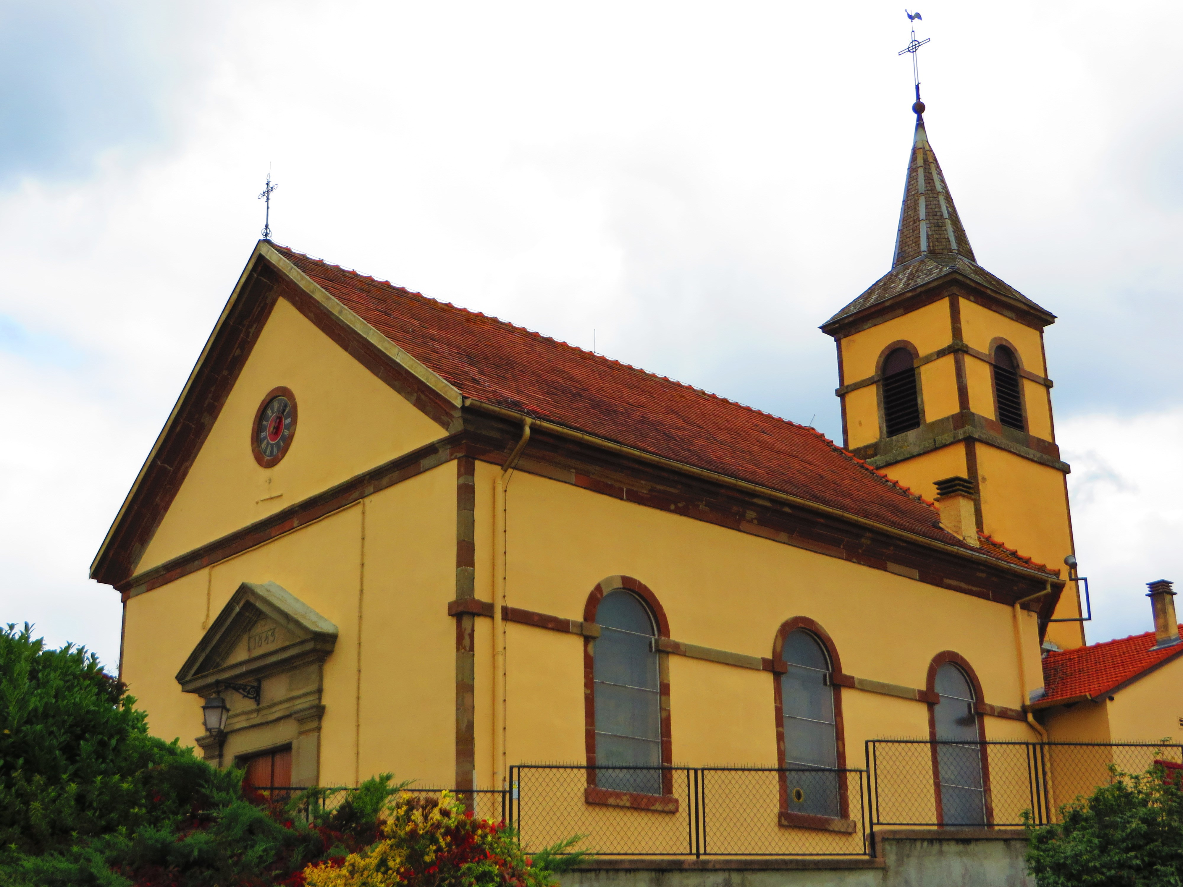 Richeling l'eglise Notre-Dame